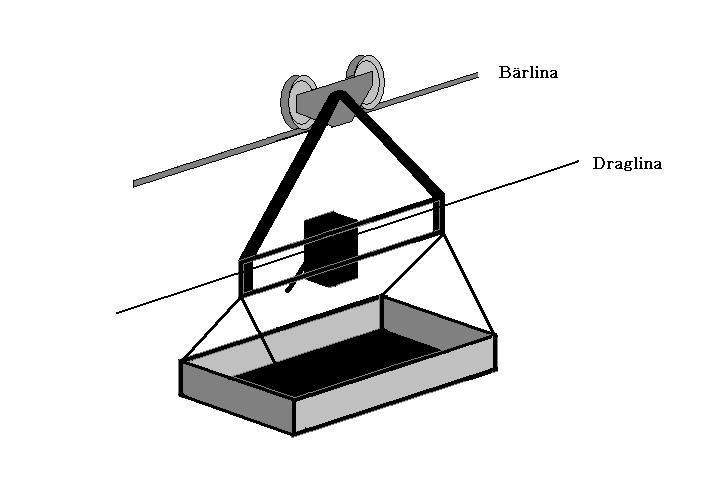 Linbanevagn vid Rejmyre Linbana